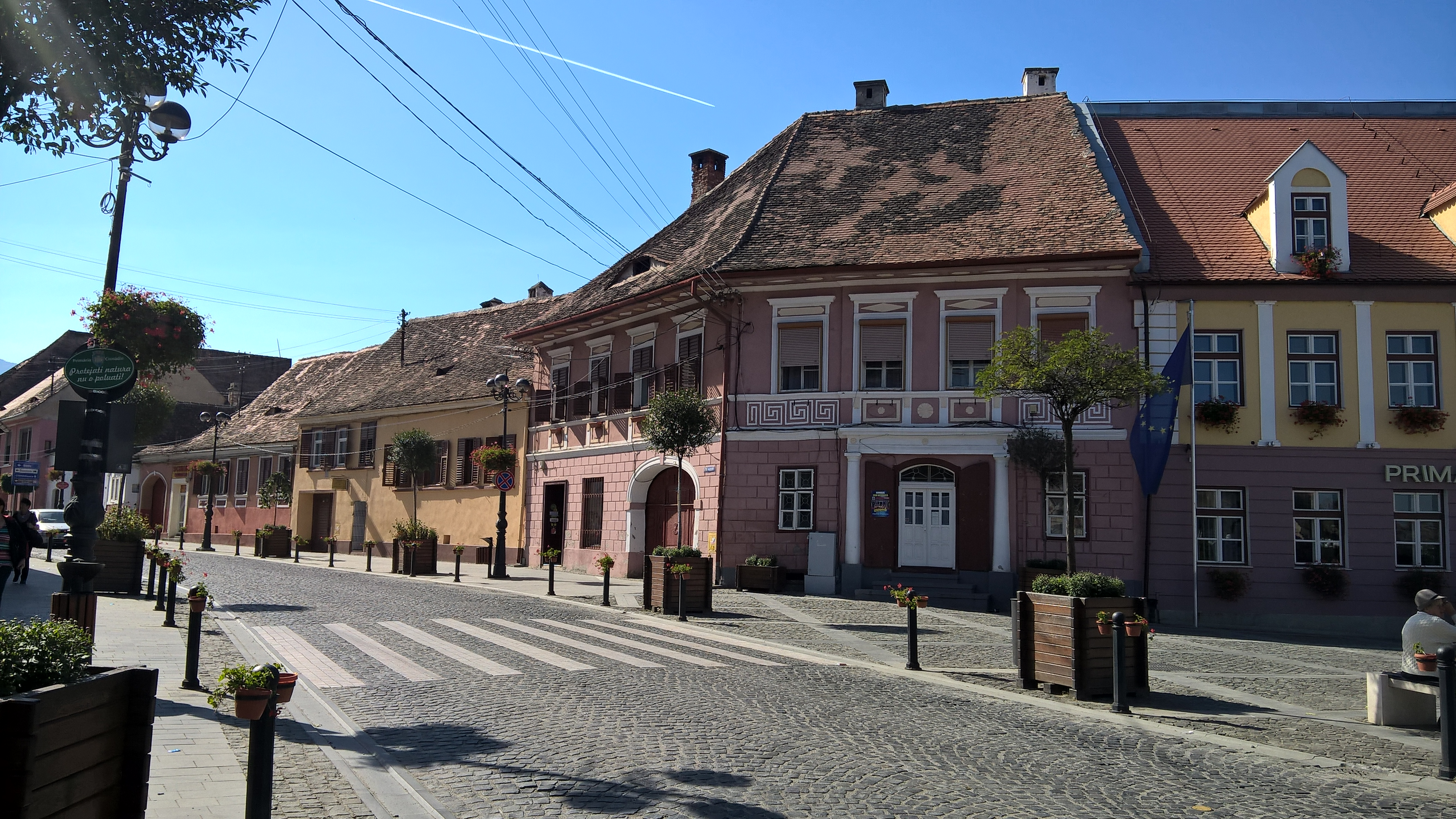 Casă centrul Cisnadie